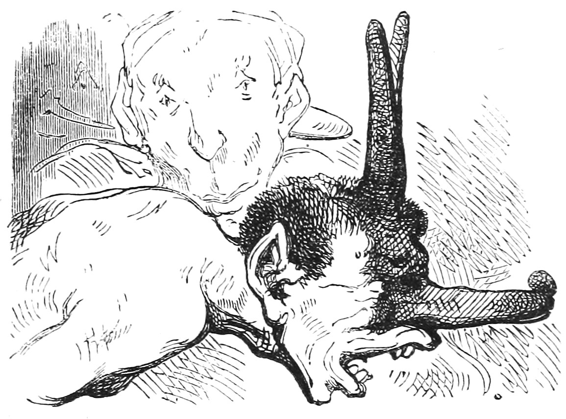 Erlik ou Erlig. Illustration du Dictionnaire infernal de Jacques Auguste Simon Collin de Plancy par Louis Le Breton, 6eme édition, 1863.